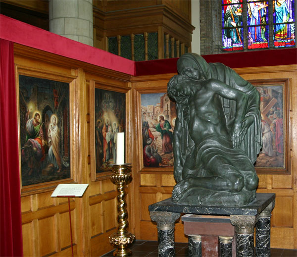 Piëta, St-Niklaaskerk Diksmuide, eigen foto oktober 2004, hiermee onder GFDL gebracht